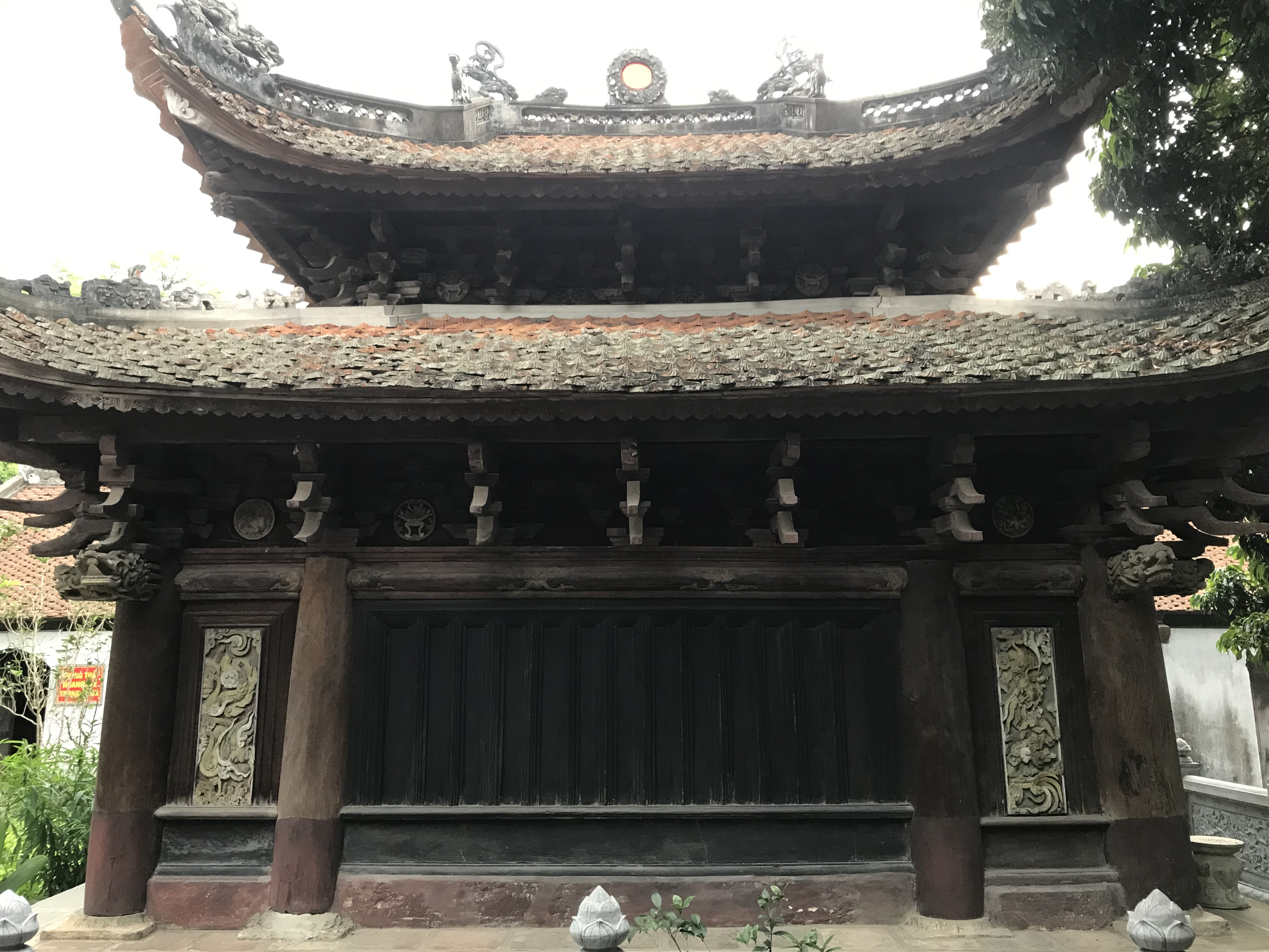 Hậu cung chùa Bối Khê